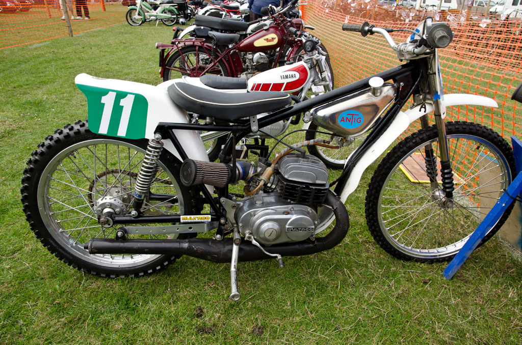 Antig Bultaco grasstrack motorcycle Llandudno Transport Festival 04/05/2013